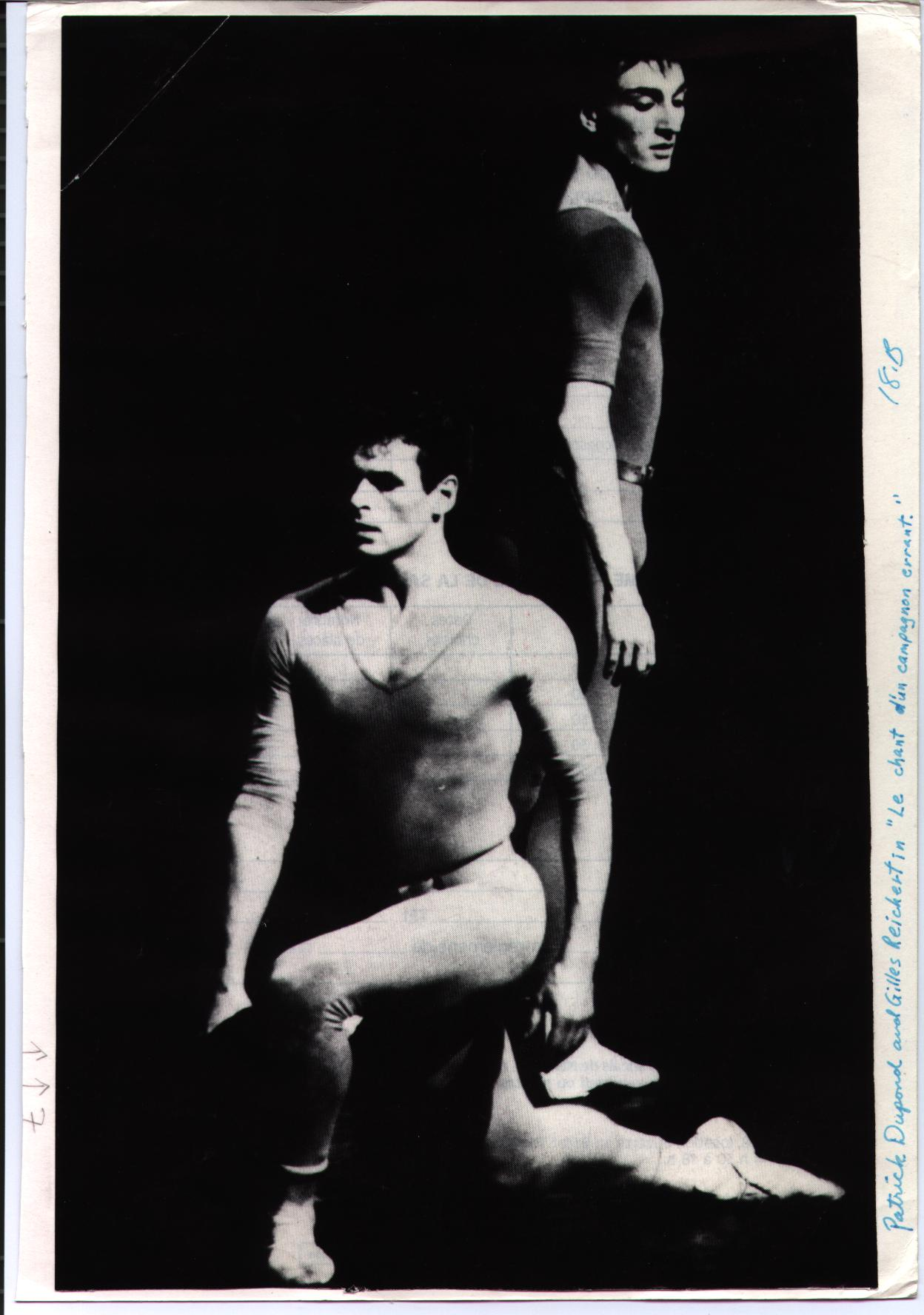 Ballet « Le Chant du Compagnon Errant » de Maurice Bejart - 1987